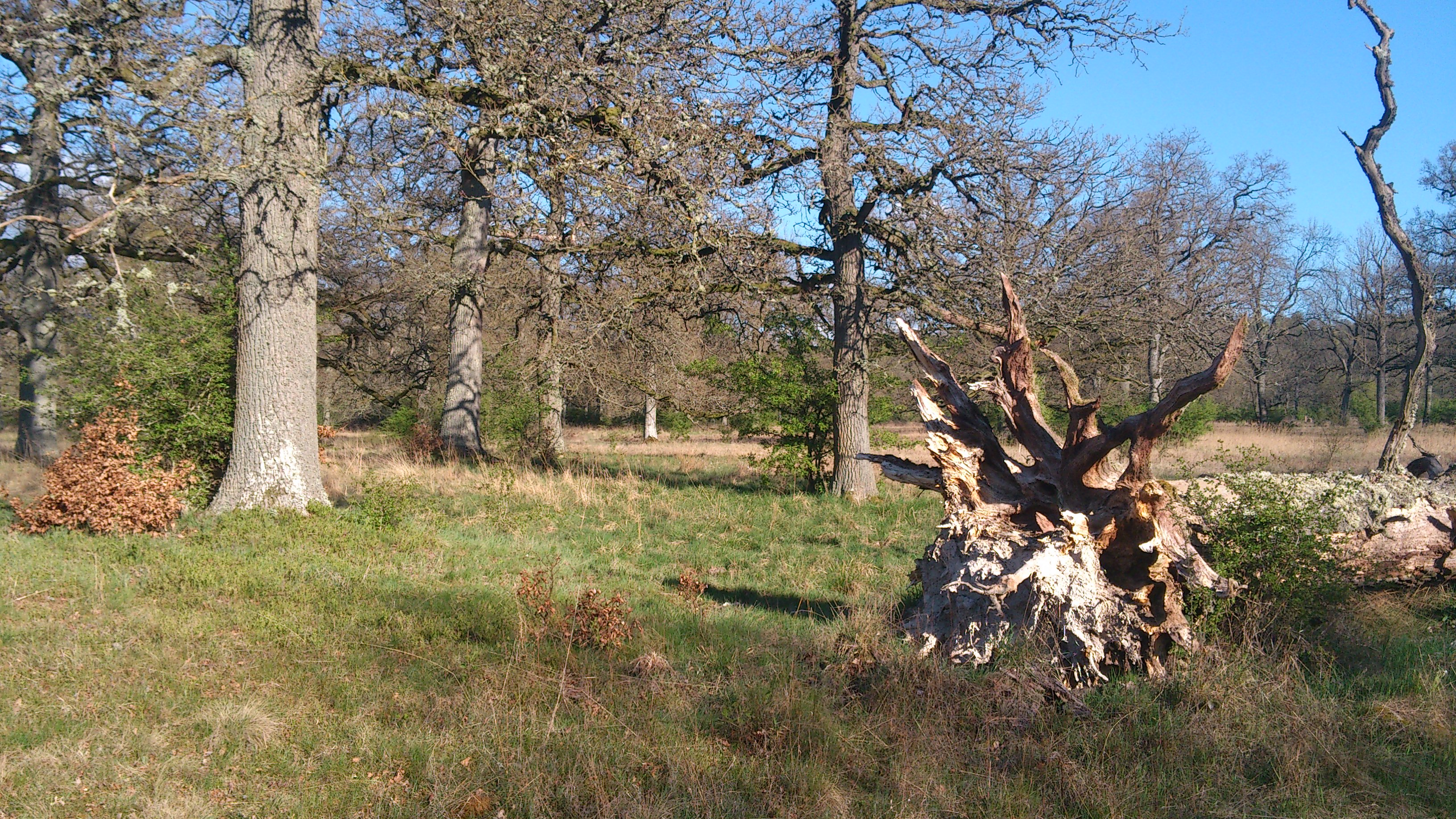 Naturschutzgebiet „Im Eschen“ (NSG 7133-087 im Landkreis Bad Kreuznach), Soonwald im Hunsrück, Rheinland-Pfalz. – „Die Eschen“, wie es im Hunsrück heißt, ist ein Waldwiesenstück mit sehr altem Eichenbestand. Die Wiesen sind sehr feucht. Man findet Amphibien wie den Feuersalamander. Man trifft Rotwild, Rehe und Schwarzwild an. Schwarzspecht, Grünspecht und Buntspecht sind hier zu Hause.